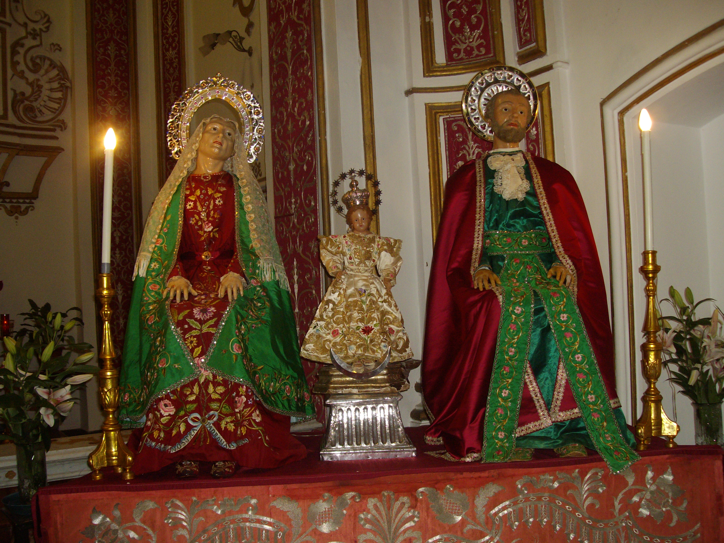 le statue settecentesche di Sant'Anna, San Gioacchino e Maria bambina nella chiesa della Trinità.